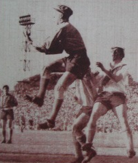 Partido del 5 de mayo de 1957, Rosario Central 1-River Plate 1. El arquero de Central Juan Carlos Bertoldi embolsa la pelota.